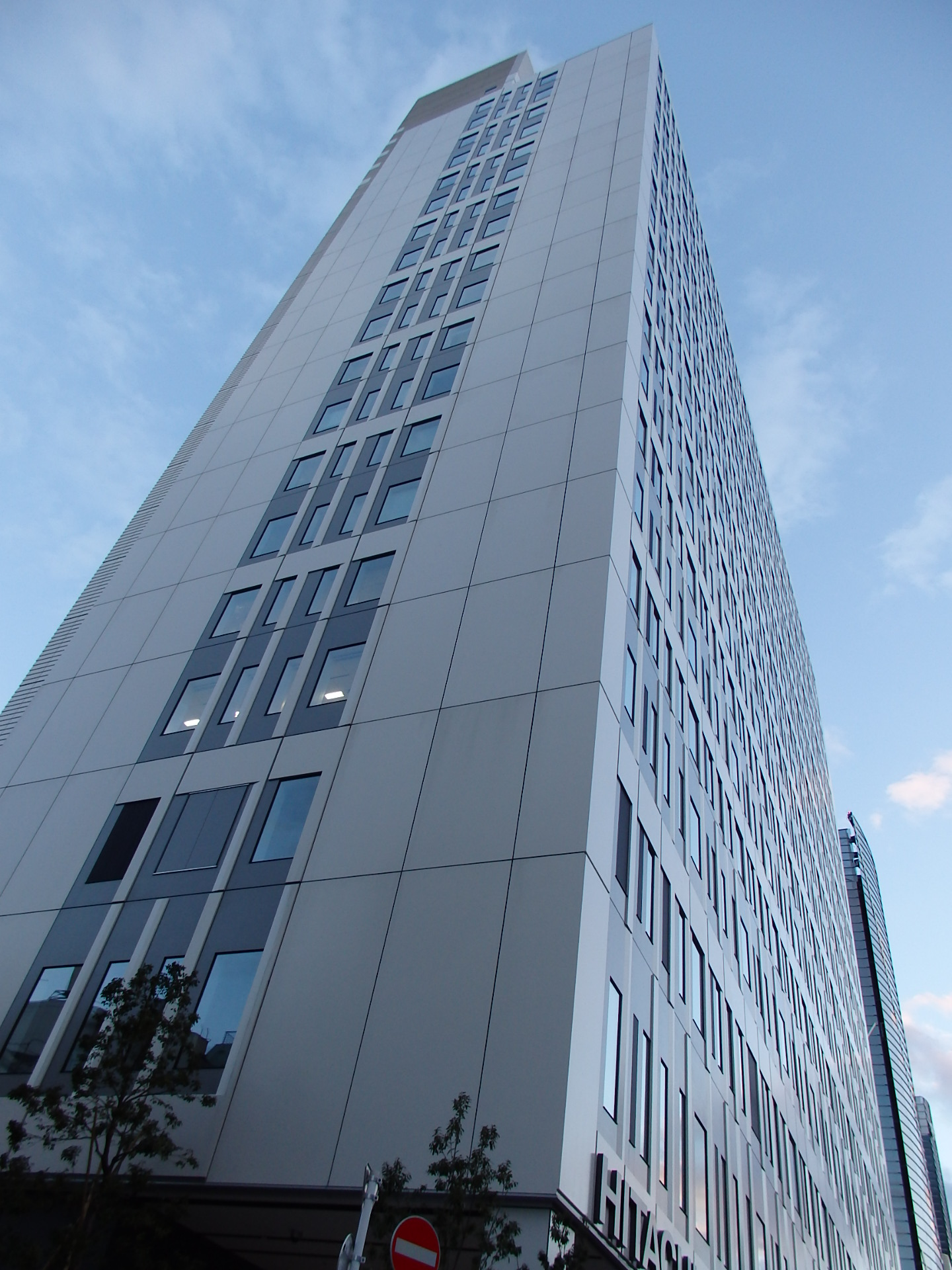 上野イーストタワー